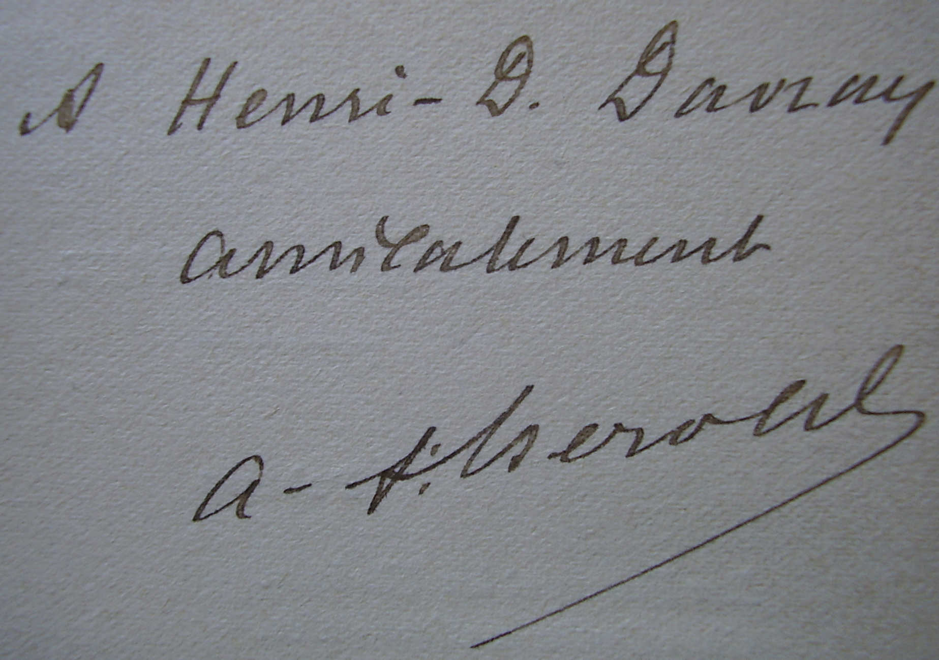 Envoi d'André-Ferdinand Herold